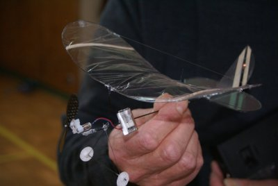 Sorta MONO D'après Martin Newell Envergure : 20cmPoids : 5gMoteur : DIDEL 4mmRéducteur : 5:1 Accu : 20mAH LiPo Radio : Plantraco 868MHz, contruction en jonc de carbone.